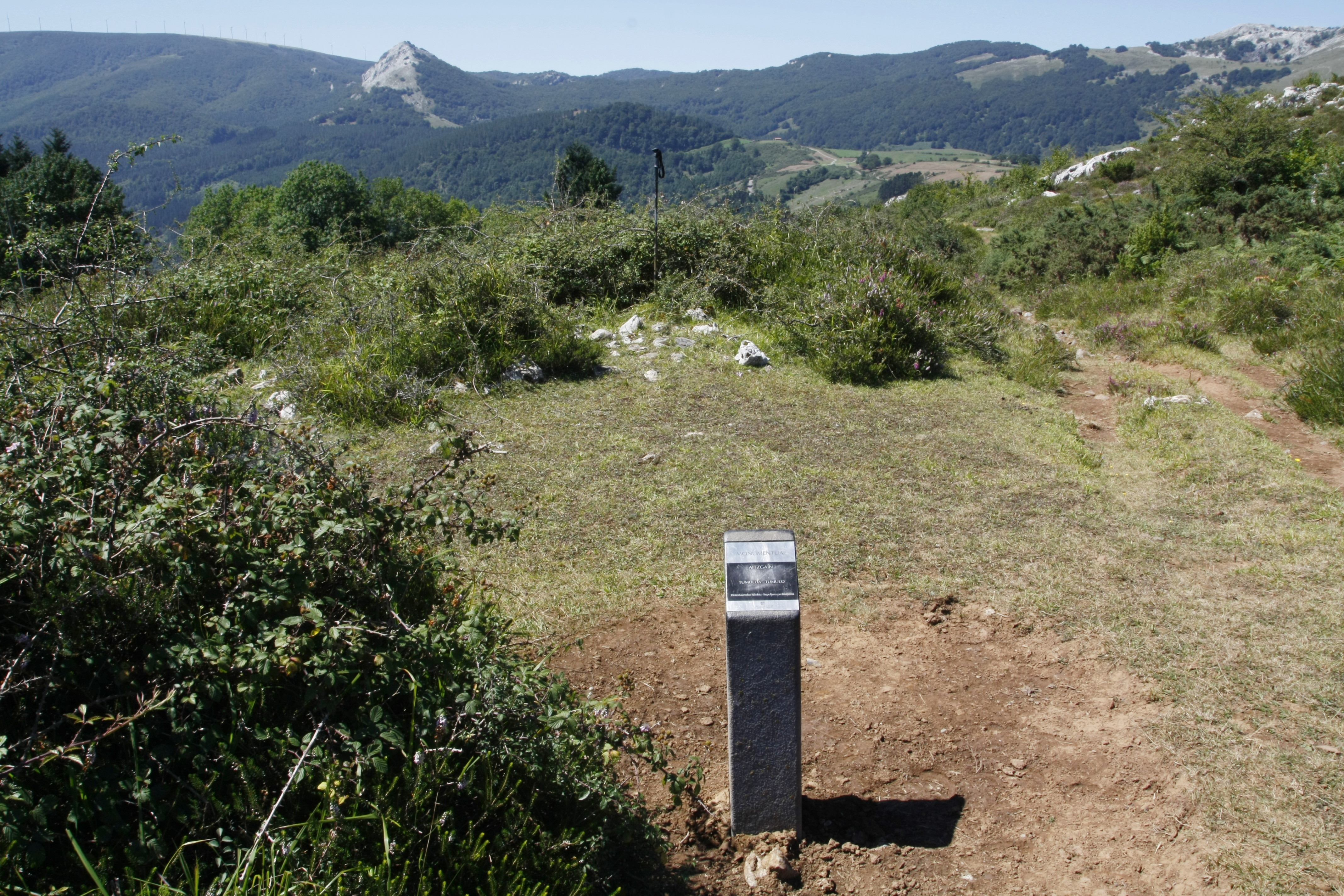 Aitzgain tumulua